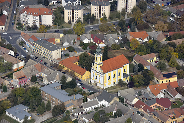 Tolna, katolikus templom a magasból